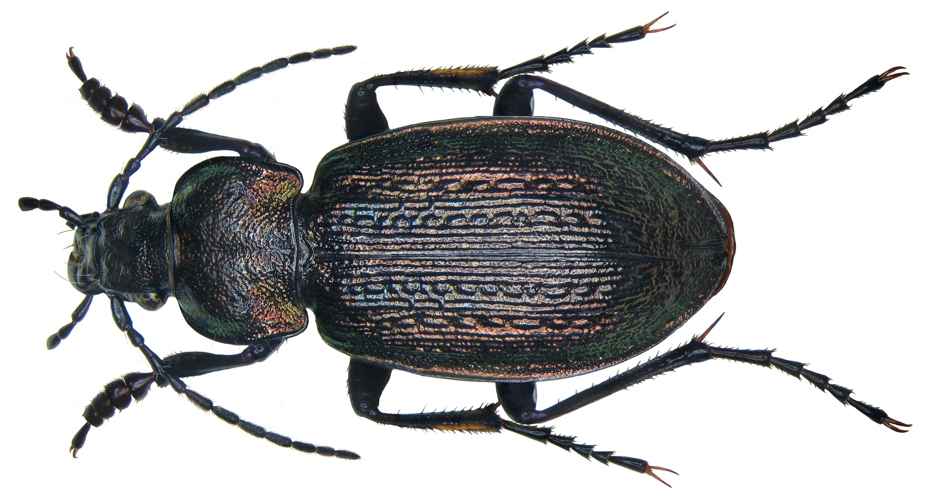 Familie: Carabidae Grösse: 13-23 mm Verbreitung: Palaearktis, von Mitteleuropa bis Sachalin Fundort: Russland, Altai, Aktasch leg. Nikolaevsky, 1991; det. U.Schmidt, 1995 Foto: U.Schmidt, 2008